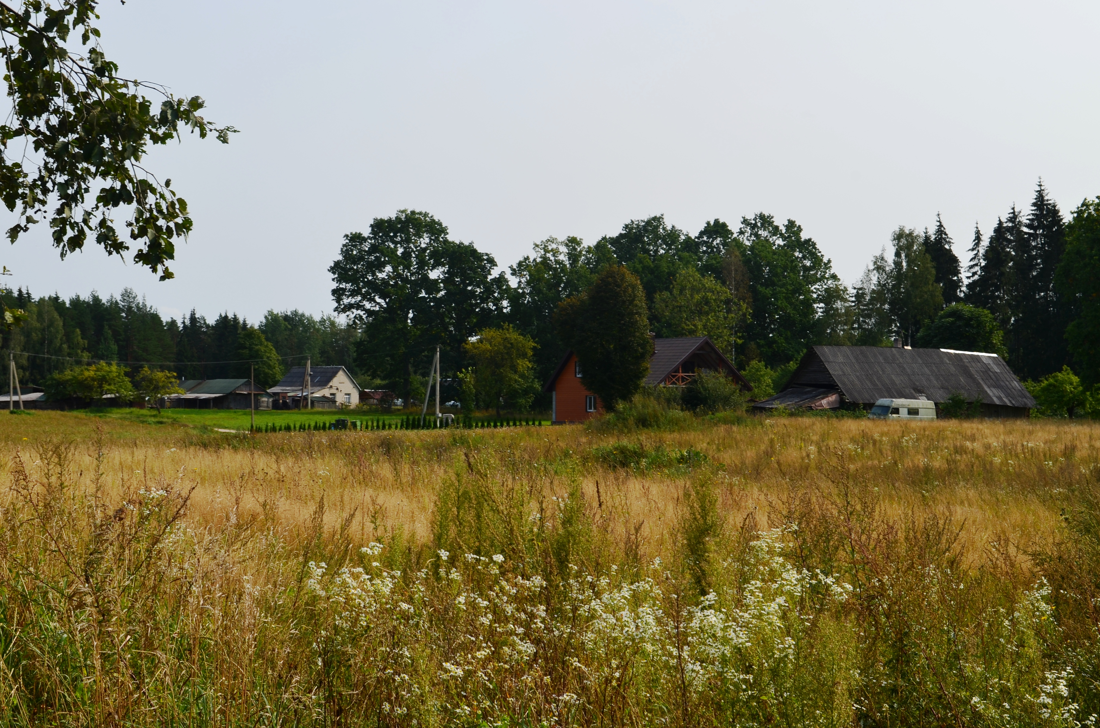 Uosininkai I, Mickūnų sen., Vilniaus raj.